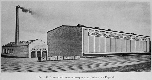 Склад-холодильник акционерного общества «Юнион» в Кургане до Октябрьской революции.